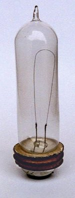 Carl Freiherr Auer von Welzbach 1898-ban készített ozmium lámpája.